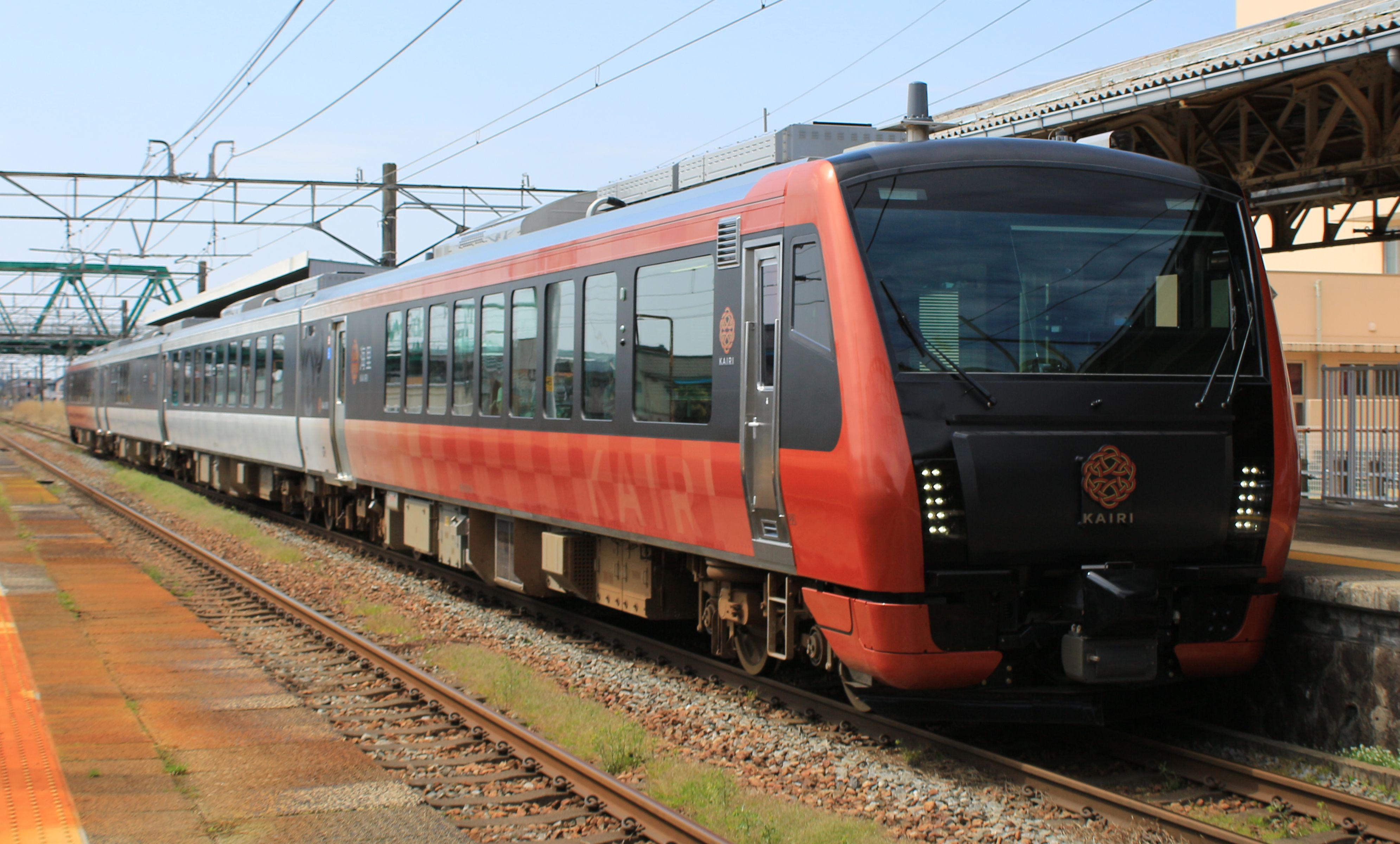 JR東日本HB-E300系気動車 海里(KAIRI)